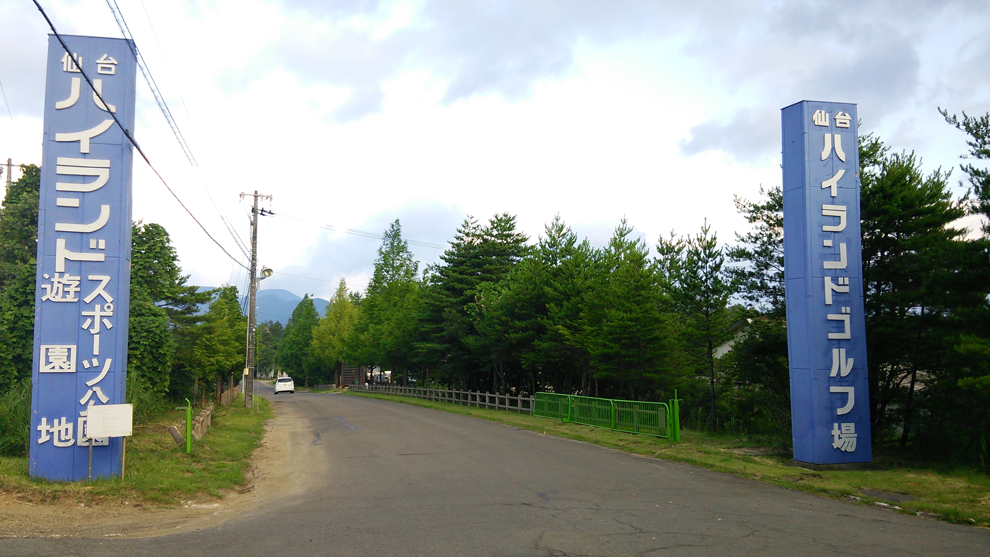 仙台ハイランド入口